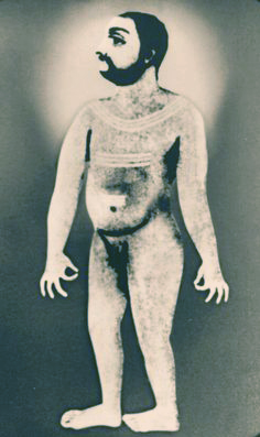 நெரூர் சித்தர் சதாசிவ பிரமேந்திரரின் உருப்படம்